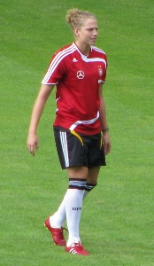 Kim Kulig